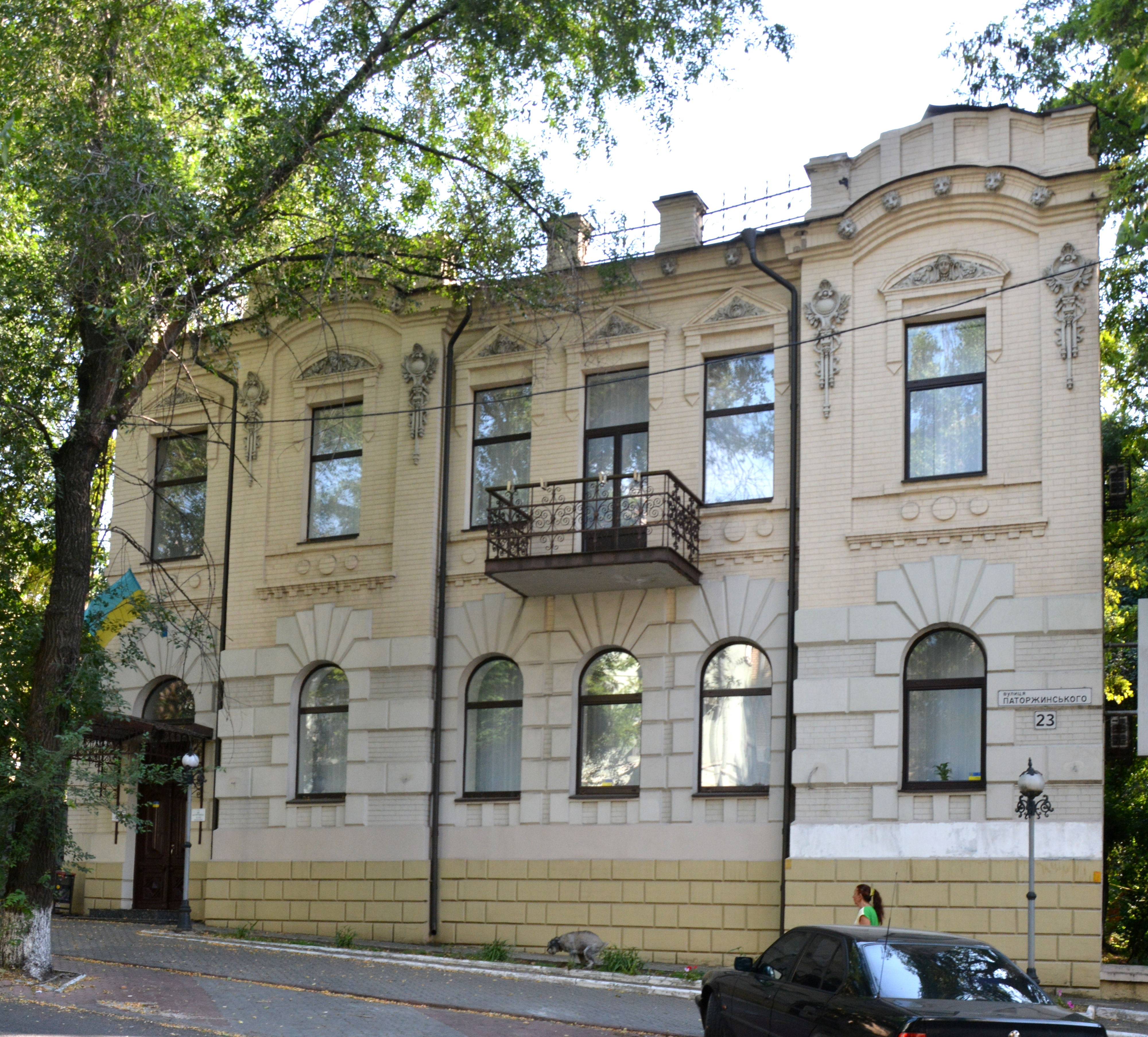 Особняк, Дніпропетровськ, Паторжинського вул., 23